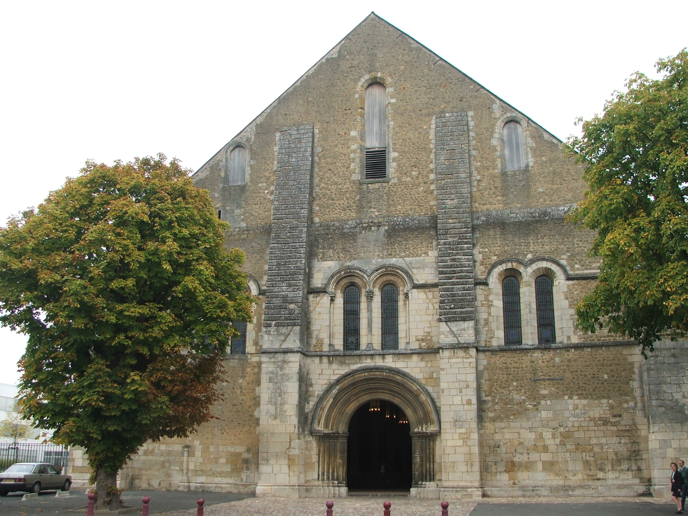 L'hôtel-dieu de coëffort au Mans, sur la place de la Mission au débouché du secteur centre vers le secteur sud-ouest.